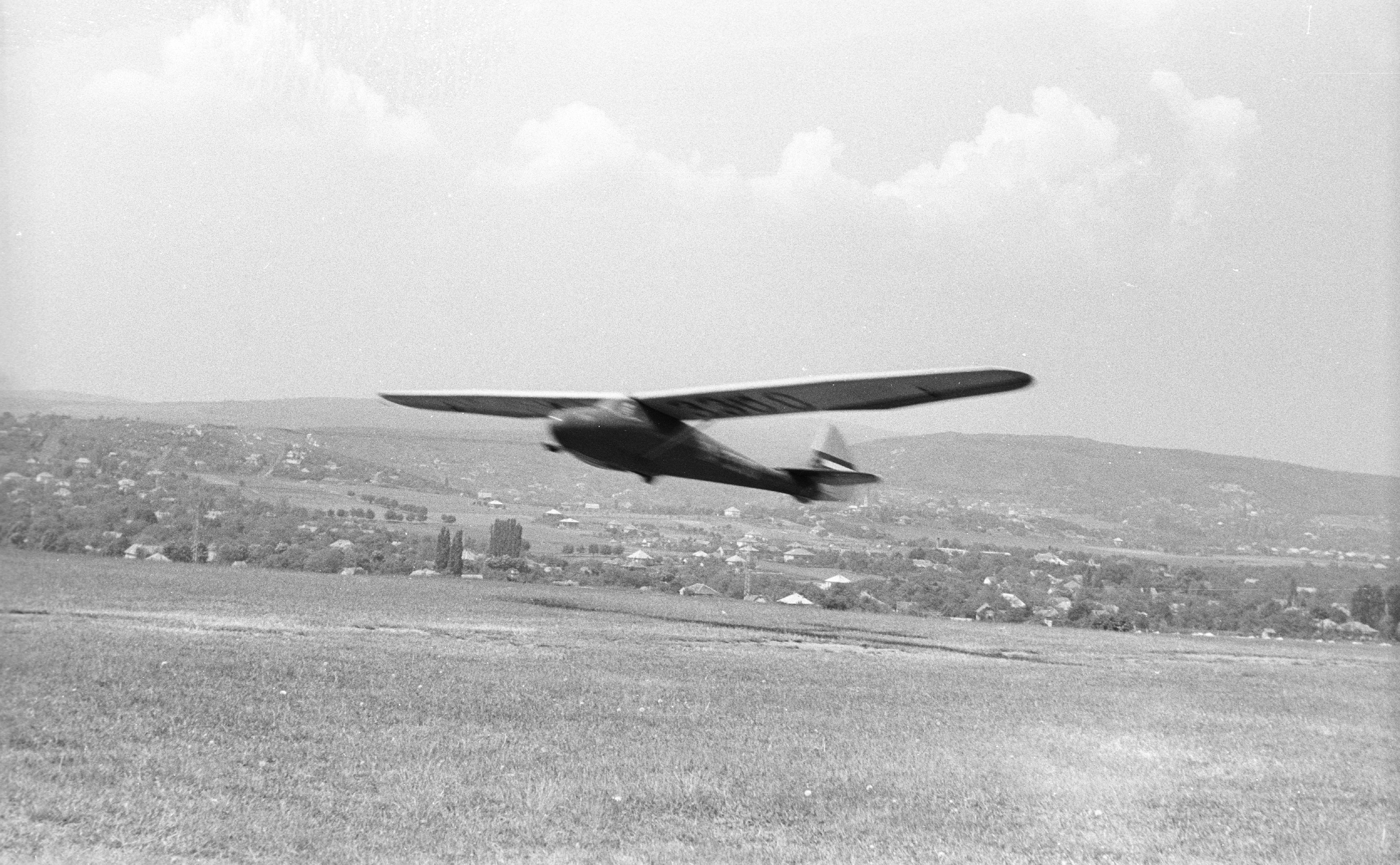 Rubik D-Pilis vitorlázó repülőgép. Location: Hungary, Budapest II., Hármashatárhegy Airport Tags: Budapest Title: Rubik D-Pilis vitorlázó repülőgép.